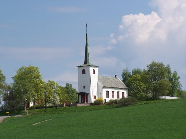 Kroer kirke i Ås kommune, Akershus, Norway